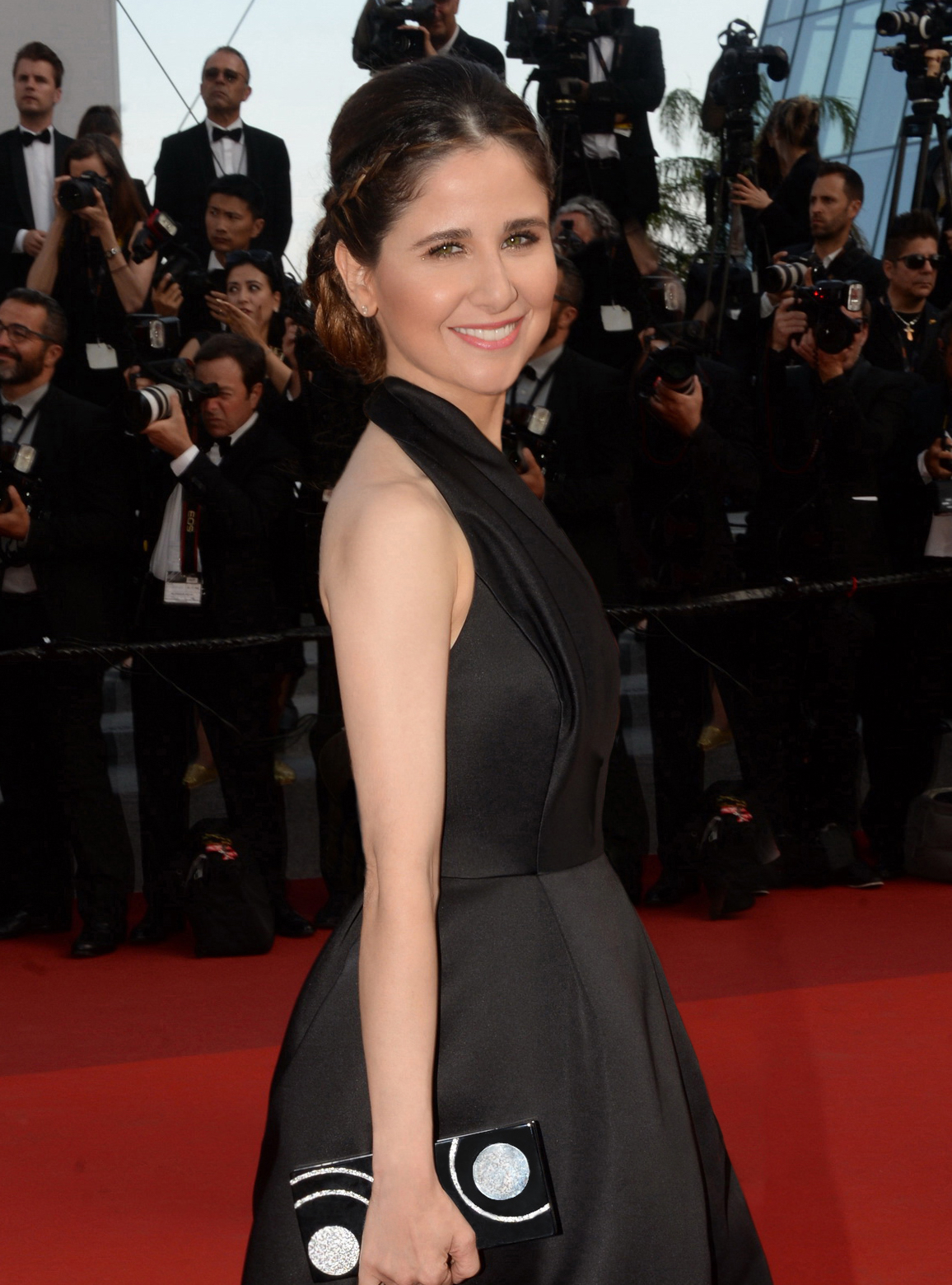 Adriana Ferreyr en el Festival de cine de Cannes de 2017.